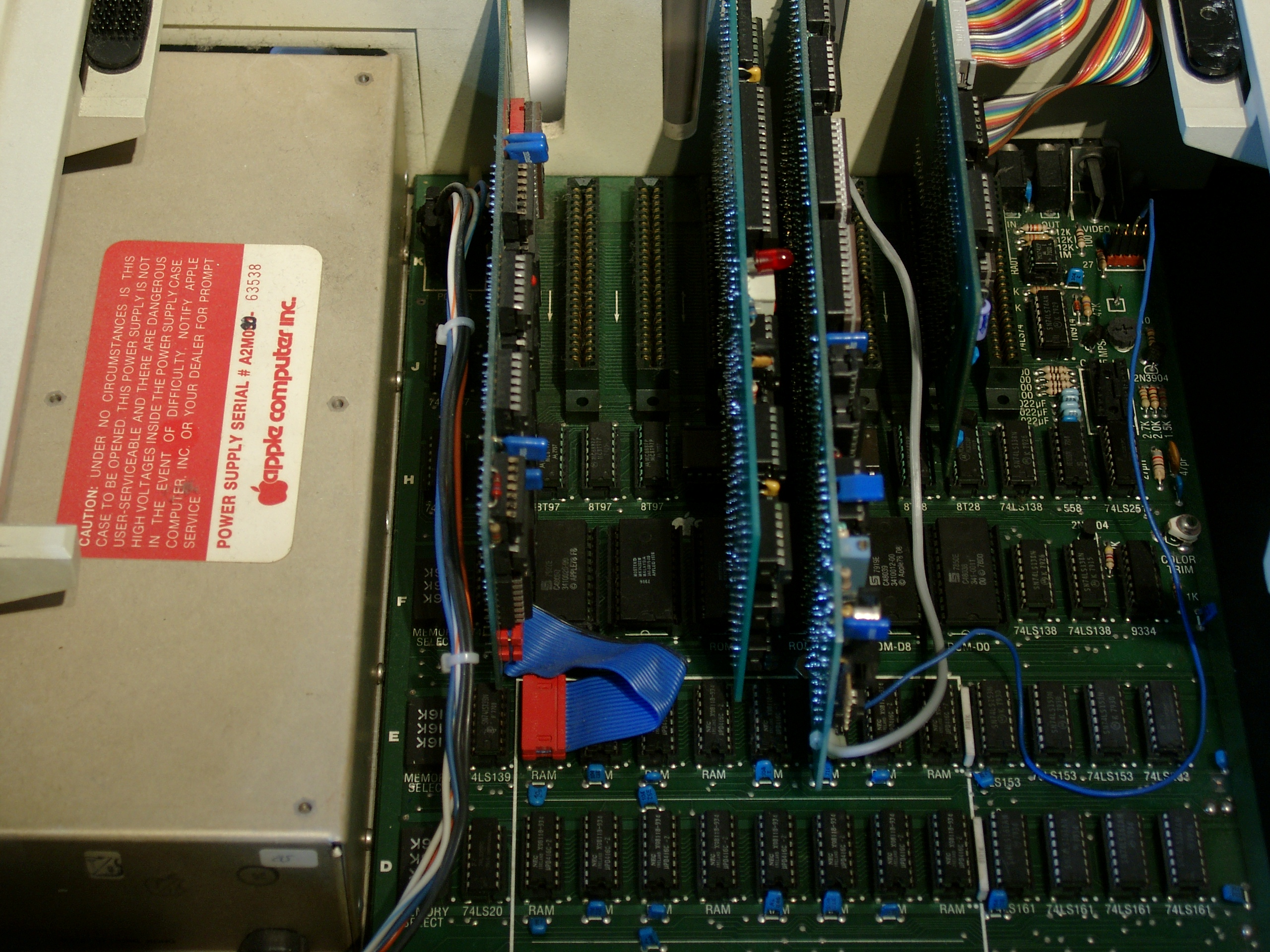 Grundplatine, Peripherie Karten und Netzteil Apple II